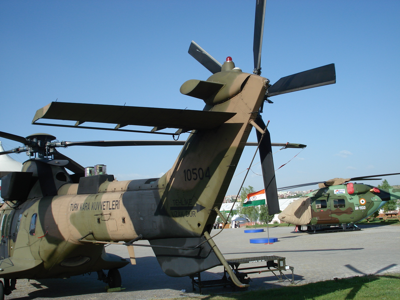 IDEF '07 Savunma Fuarı'nda çekildi.AS-532 Cougar.23 Mayıs 2007